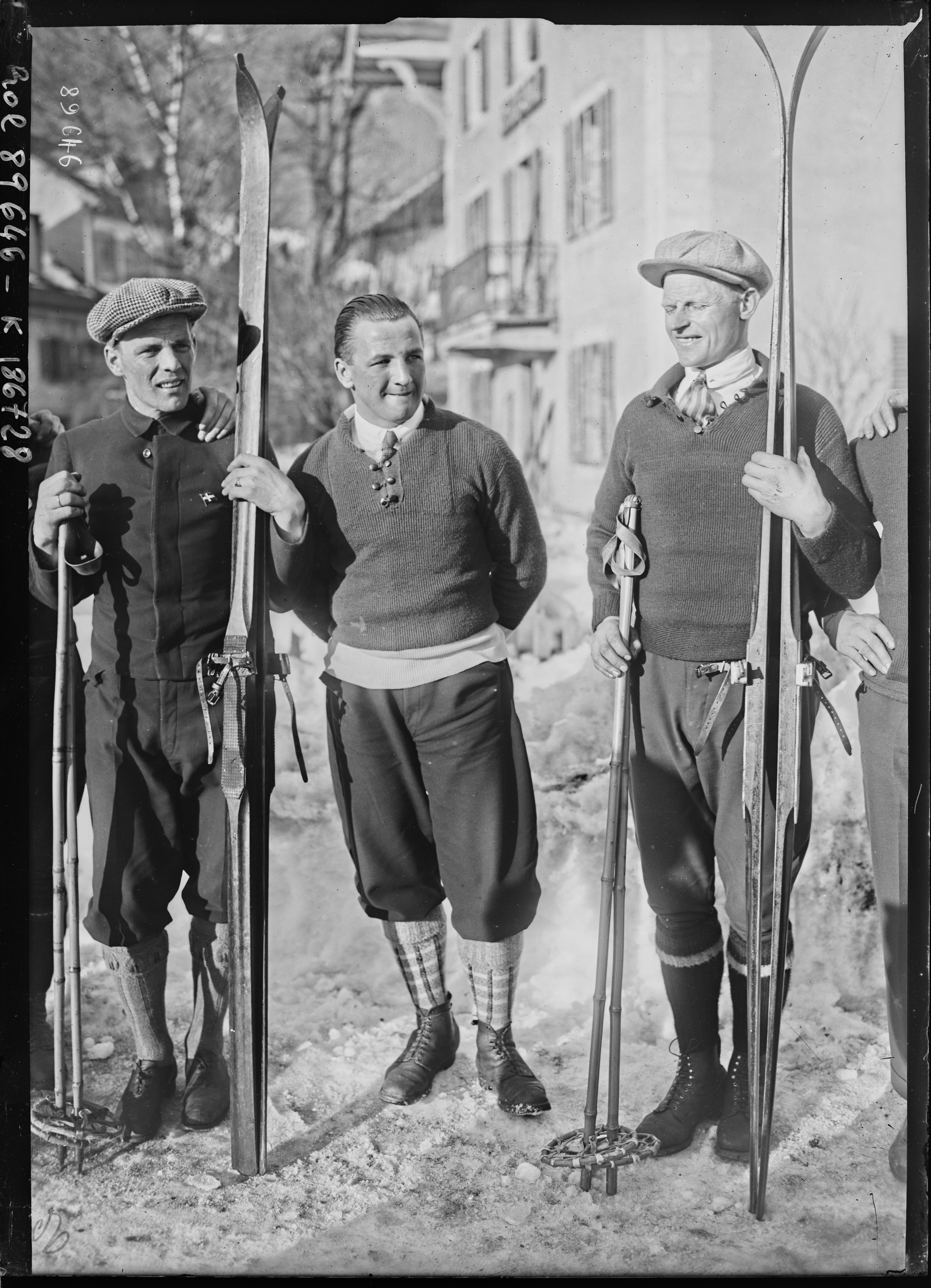 [Jacob Tullin] Thams, gagnant probable de saut [au milieu du groupe, et Haug à gauche, aux Jeux olympiques d'hiver] : [photographie de presse] / [Agence Rol]